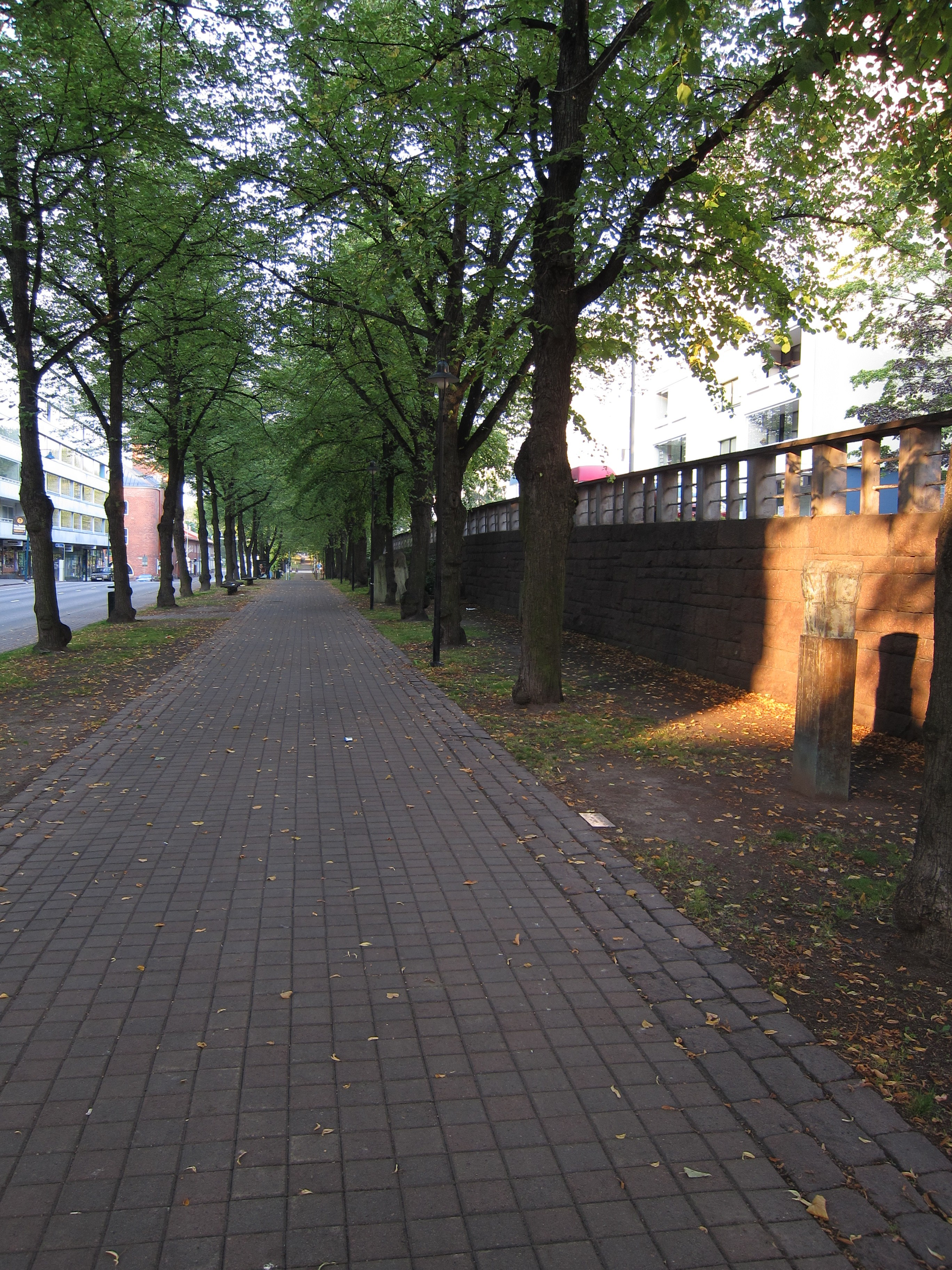 Kotkan Veistospuistoa Kotkansaarella. Etualalla oleva teos on Kain Tapperin Pylväs.